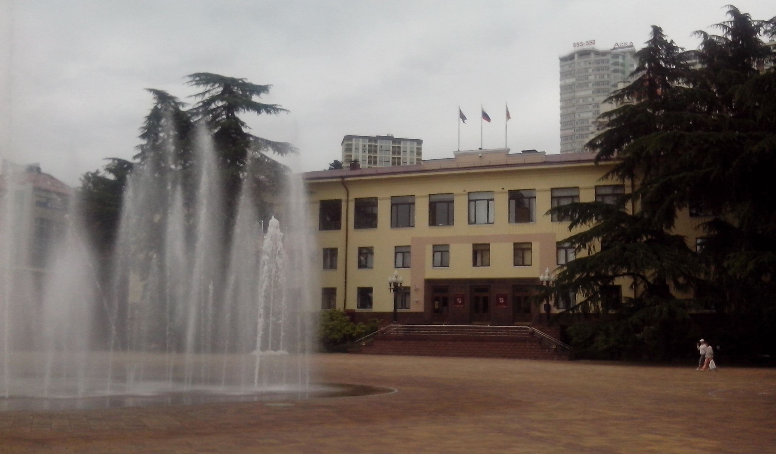 Администрация города Сочи